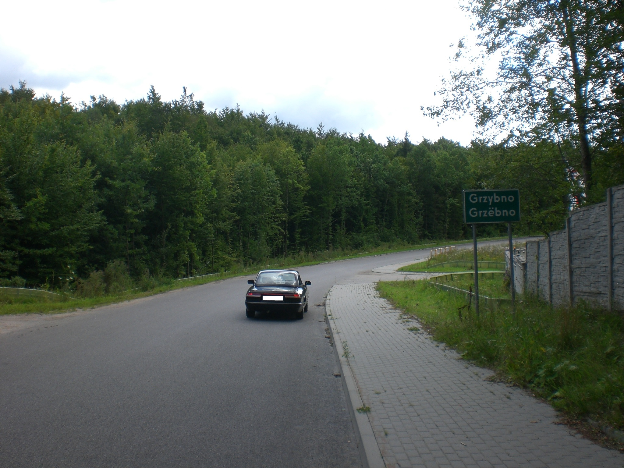 Grzybno